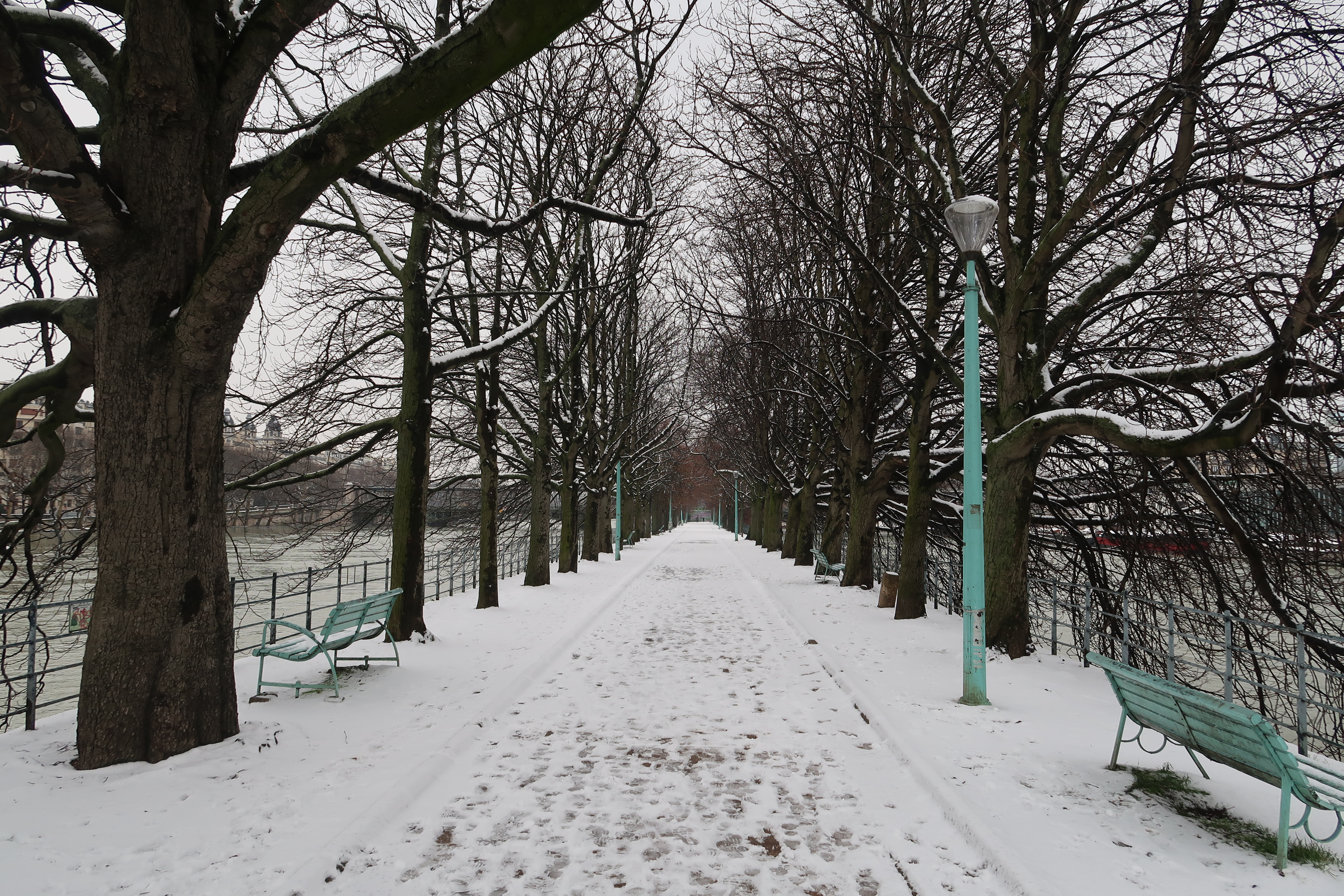 Île aux Cygnes (Paris) sous la neige (février 2018).